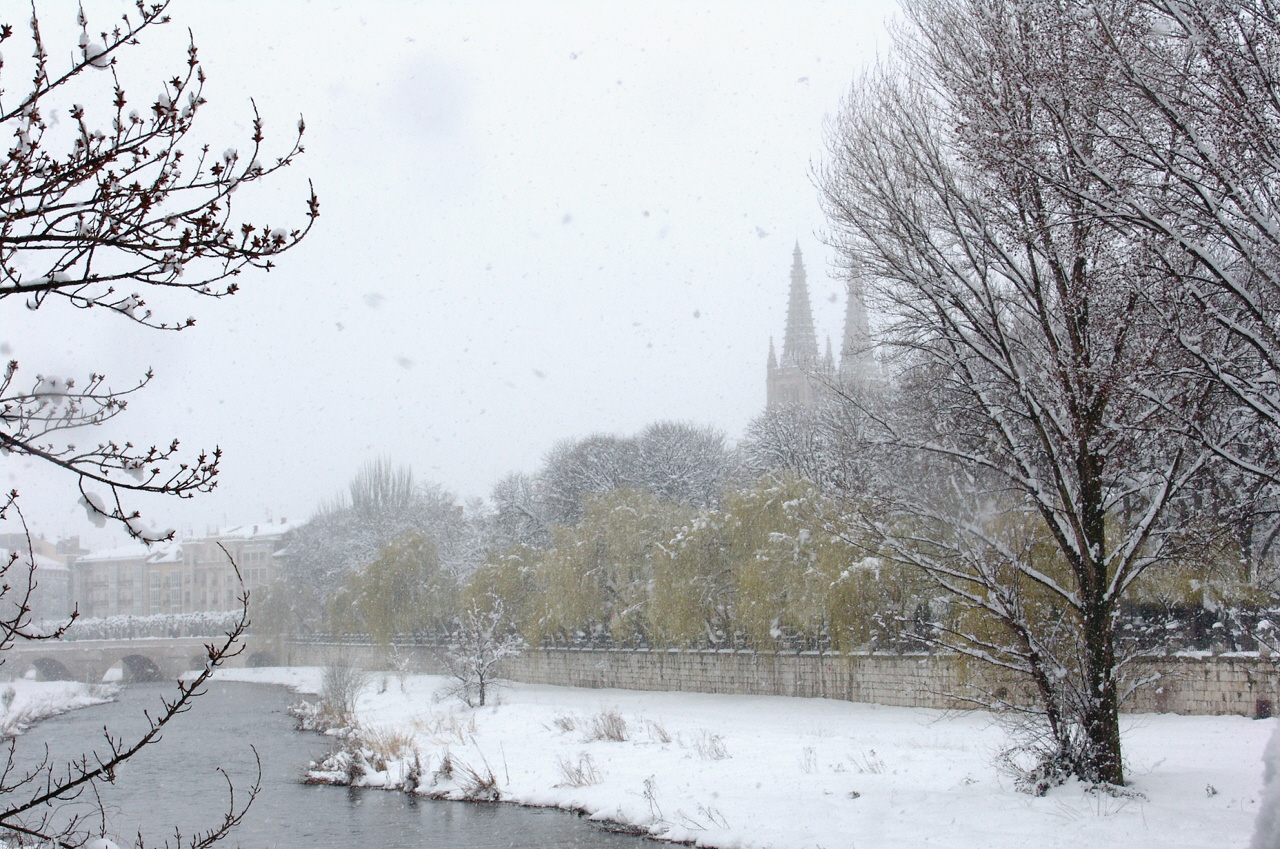 Río Arlanzón nevado, al fondo la catedral, Burgos, España.